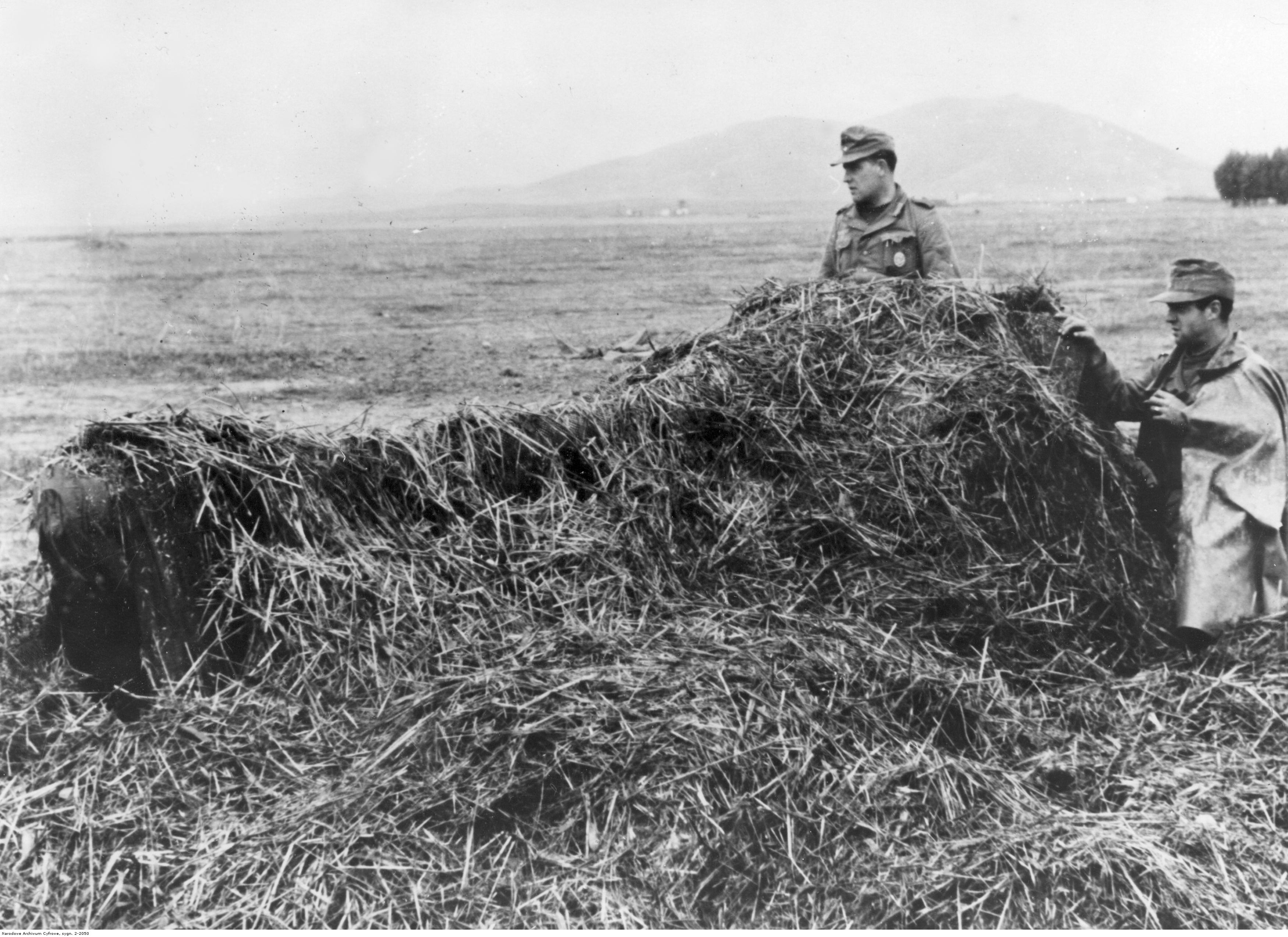 Zamaskowane działo przeciwpancerne Pak 40 na froncie tunezyjskim. Widoczni dwaj żołnierze na stanowisku przy dziale.